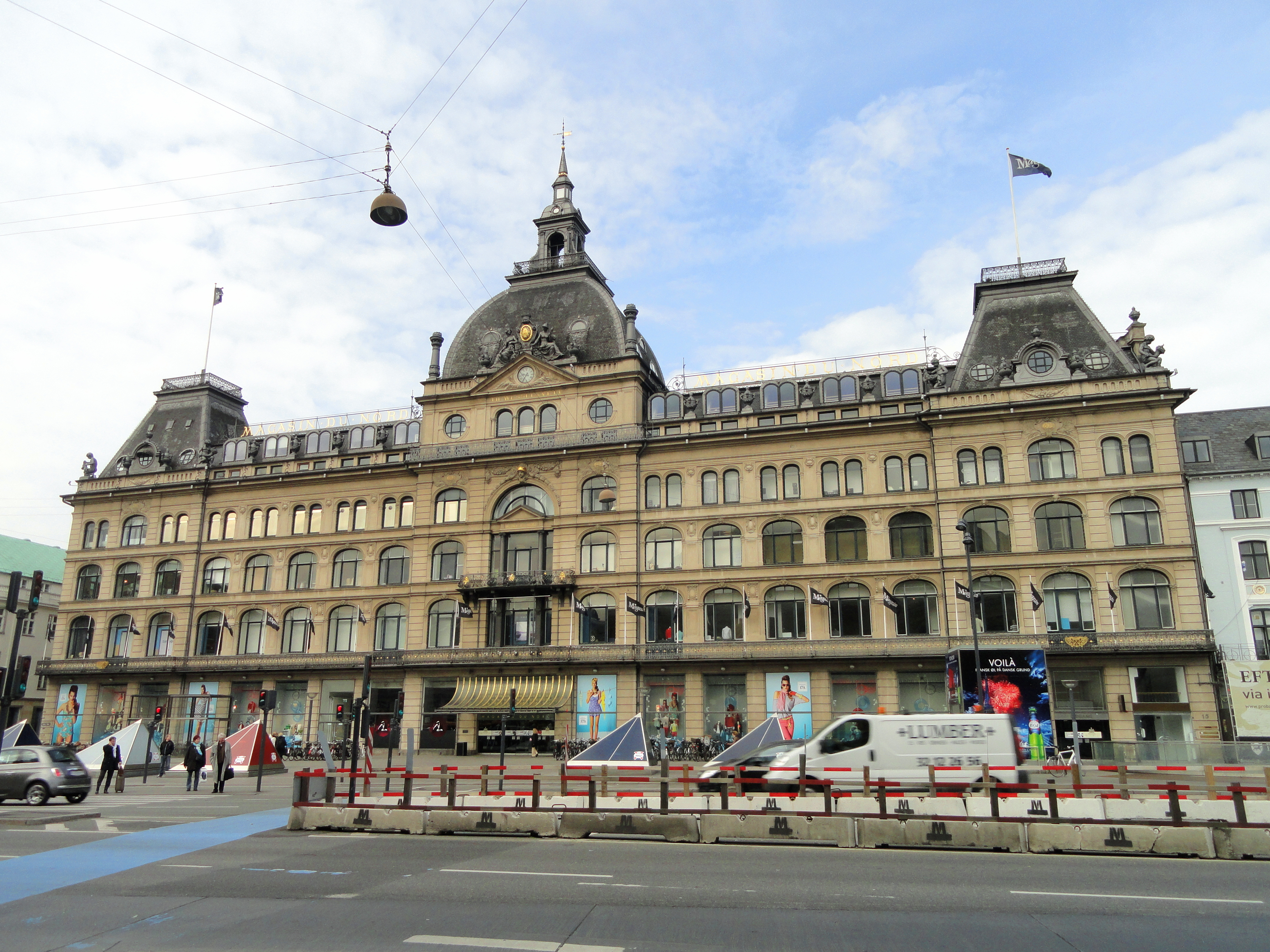 Magasin du Nord, Copenhagen, Denmark.